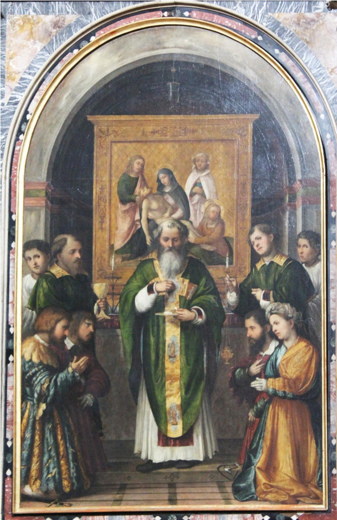 La messa di Sant'Apollonio (Romanino) - Chiesa di S. Maria in Calchera - Brescia